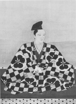 小笠原政信の肖像。